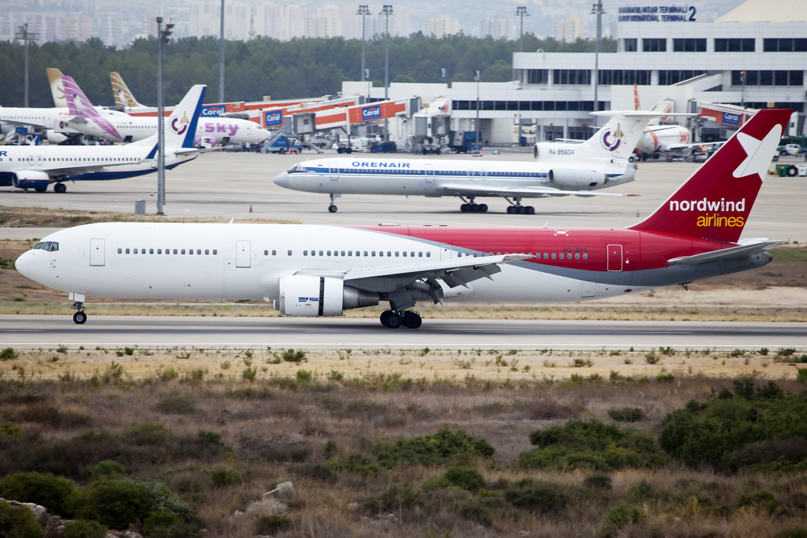 Antalya